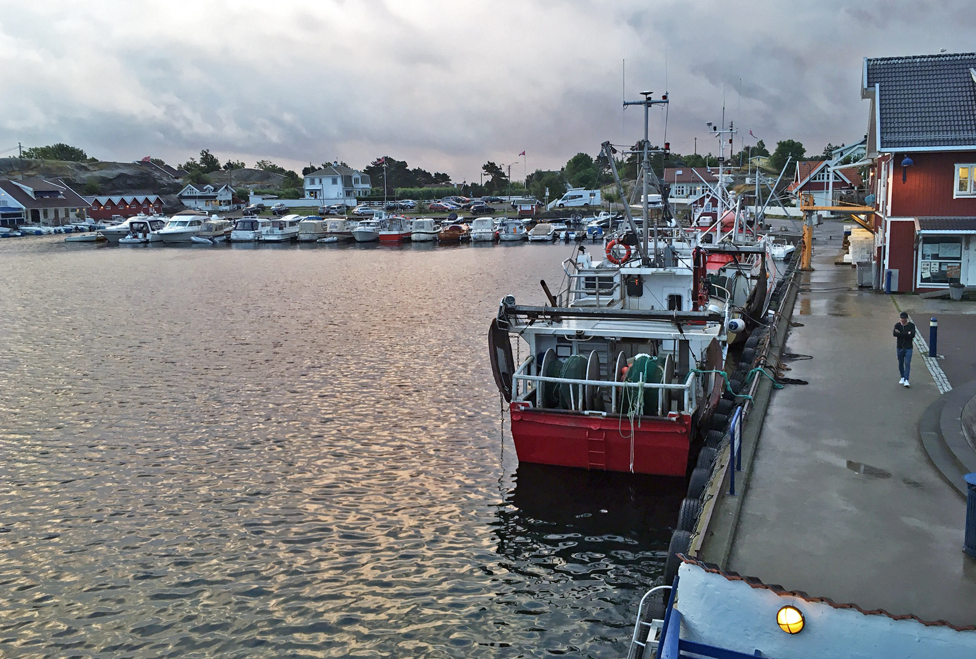 Fiskebåter ved kai i Sandøsund 2017